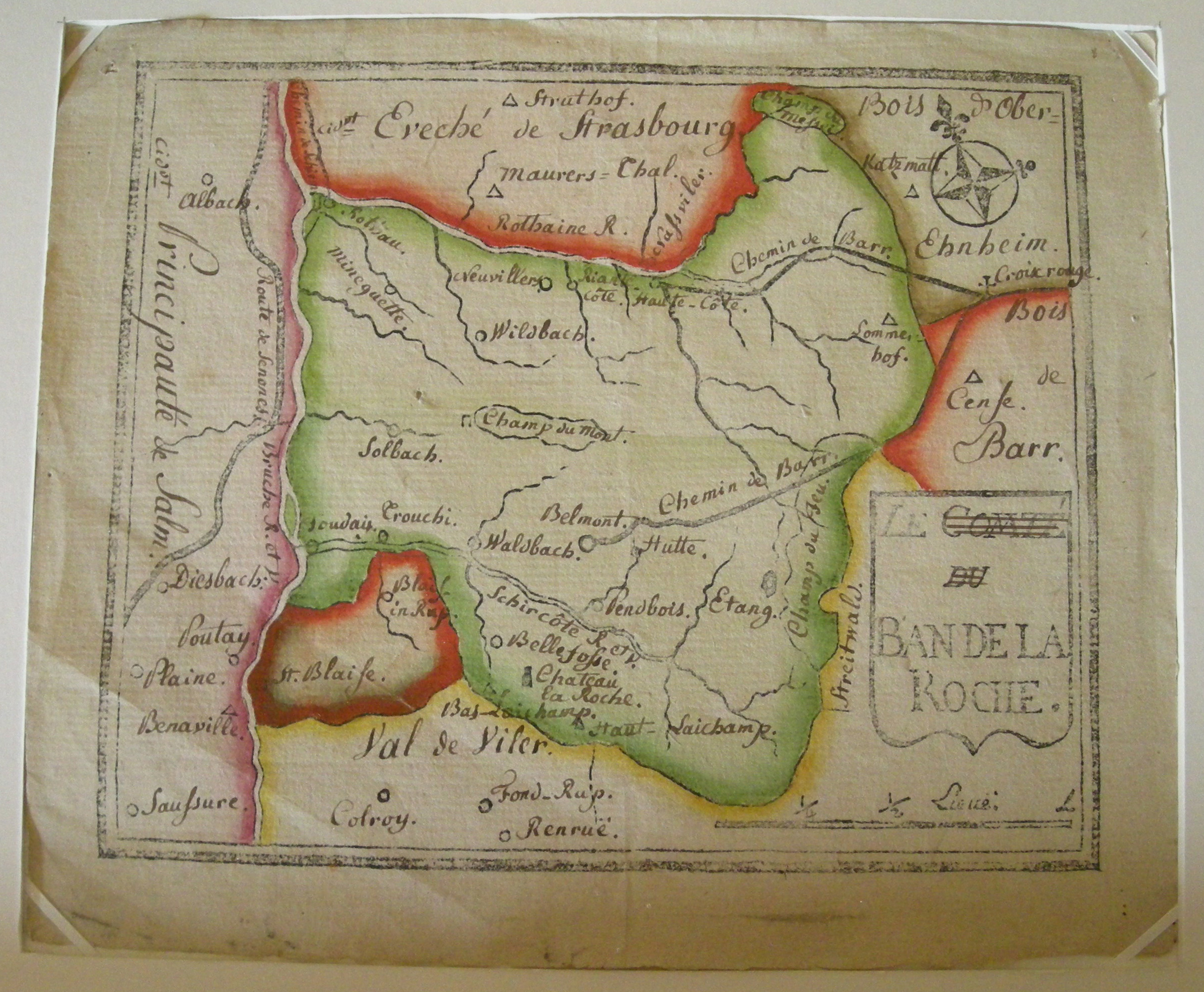 Carte muette du Ban-de-la-Roche (Alsace), gravée sur bois par le pasteur Jean-Frédéric Oberlin en 1776. Le mot comté a été barré sur cette carte après la Révolution.